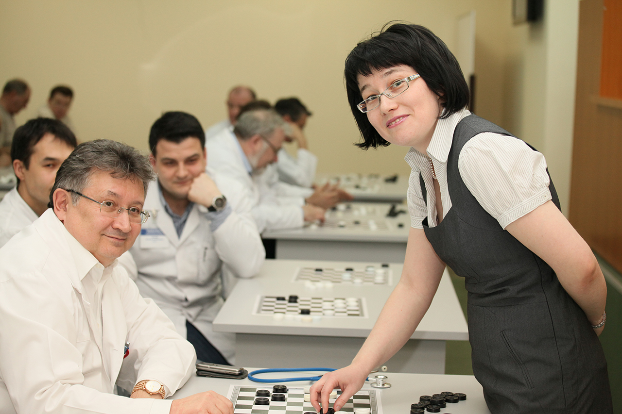 Профессор Ш. Х. Ганцев (на переднем плане слева) и гроссмейстер Т. Тансыккужина во время сеанса одновременной игры чемпионки мира. Ганцев Шамиль Ханафиевич (род. 1951) — российский учёный и клиницист, хирург, онколог; общественный деятель. Доктор медицинских наук, профессор. Заведующий кафедрой онкологии с курсами онкологии и патологической анатомии Института дополнительного профессионального образования Башкирского государственного медицинского университета. Директор Научно-исследовательского института онкологии БГМУ. Заслуженный деятель науки Российской Федерации. Член Общественной палаты РФ. Председатель Общественного научно-технического совета Технопарка «Сколково». Тансыккужина Тамара Михайловна (род. 1978) — российская шашистка, пятикратная чемпионка мира по международным шашкам, международный гроссмейстер.